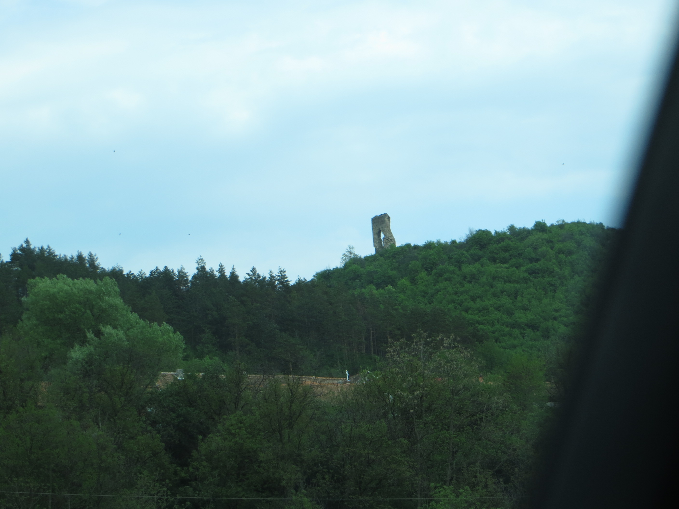 Cetatea medievală de la Mehadia, punct "Dealul Grad"